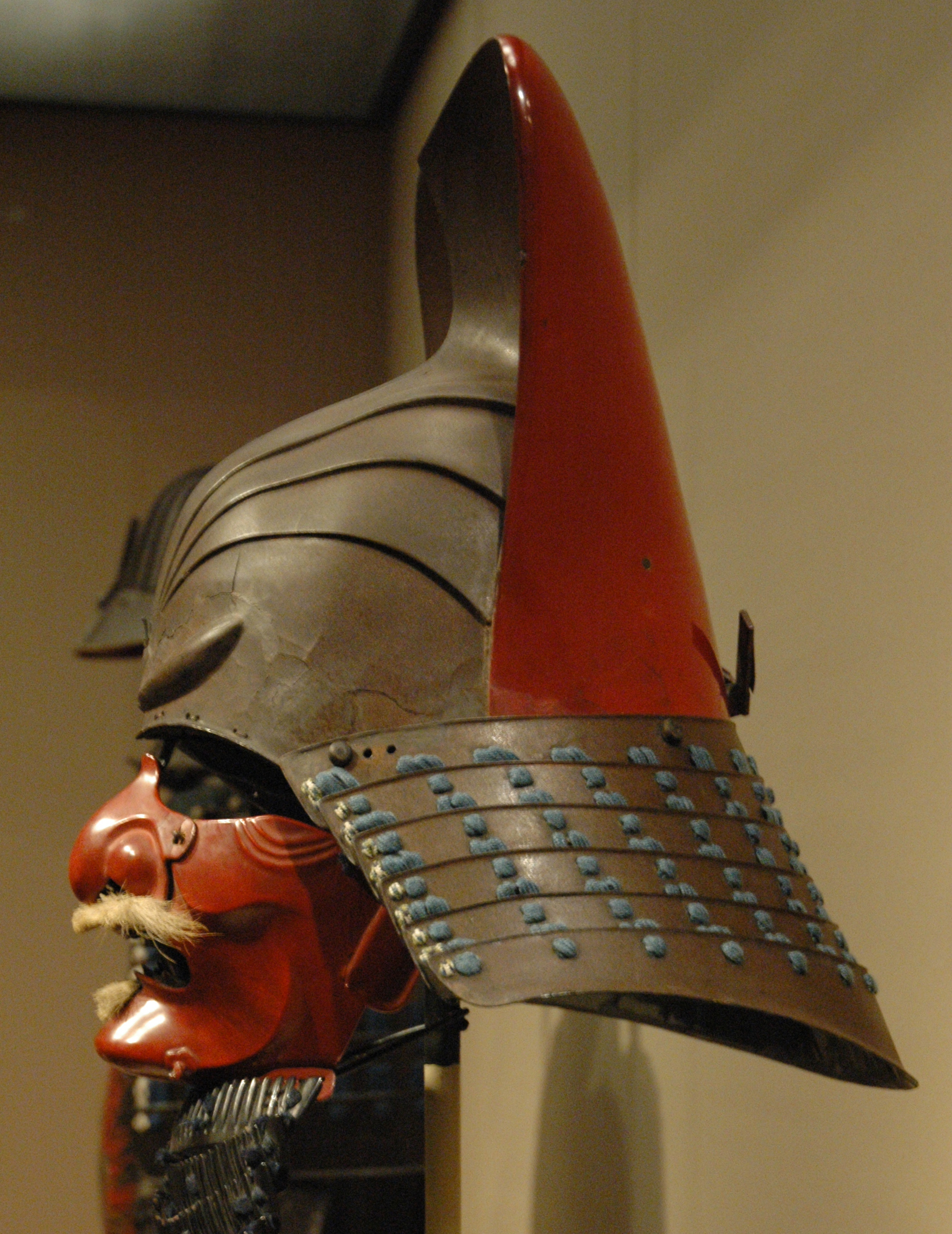 Yelmo de Samurai